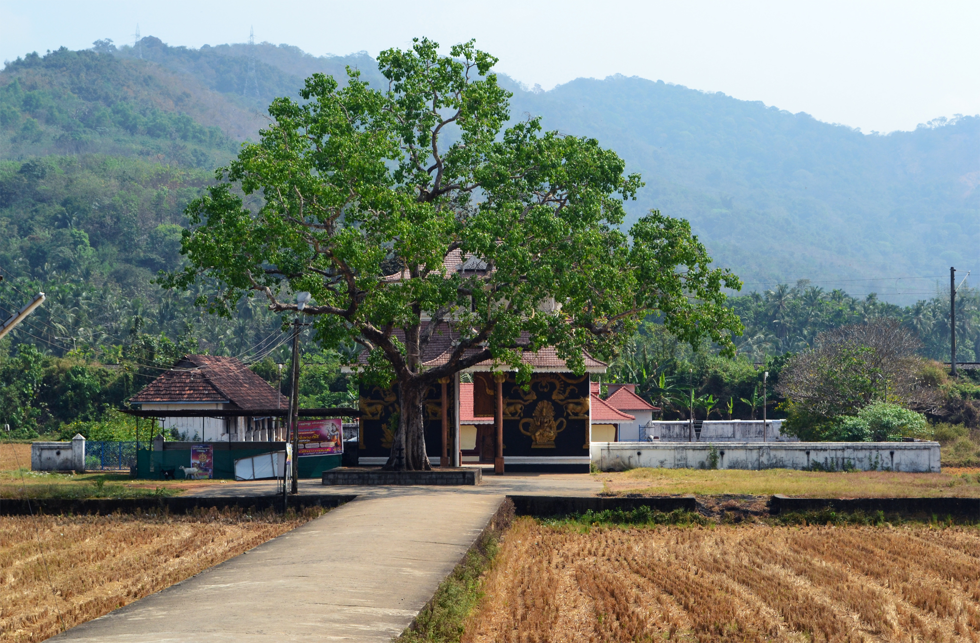 തൃശ്ശൂർ ജില്ലയിലെ വടക്കാഞ്ചേരിക്കടുത്തുള്ള പ്രശസ്തമായ ഒരു അമ്പലമാണ് ഉത്രാളിക്കാവ് അമ്പലം അഥവാ രുധിരമഹാകാളിക്കാവ് ക്ഷേത്രം. മദ്ധ്യകേരളത്തിലെ പ്രശസ്തമായ ‘പതിനെട്ടരക്കാവു്’ വേല ഉത്സവങ്ങളിൽ ഏറ്റവും പ്രധാനമാണു് വെടിക്കെട്ടിനു പ്രാധാന്യമുള്ള ഉത്രാളിക്കാവ് പൂരം.